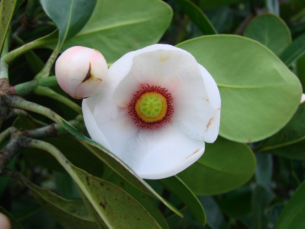 Clusia nemorosa - CLUSIACEAE Parque Nacional da Chapada Diamantina - Palmeiras - Bahia - Brasil.